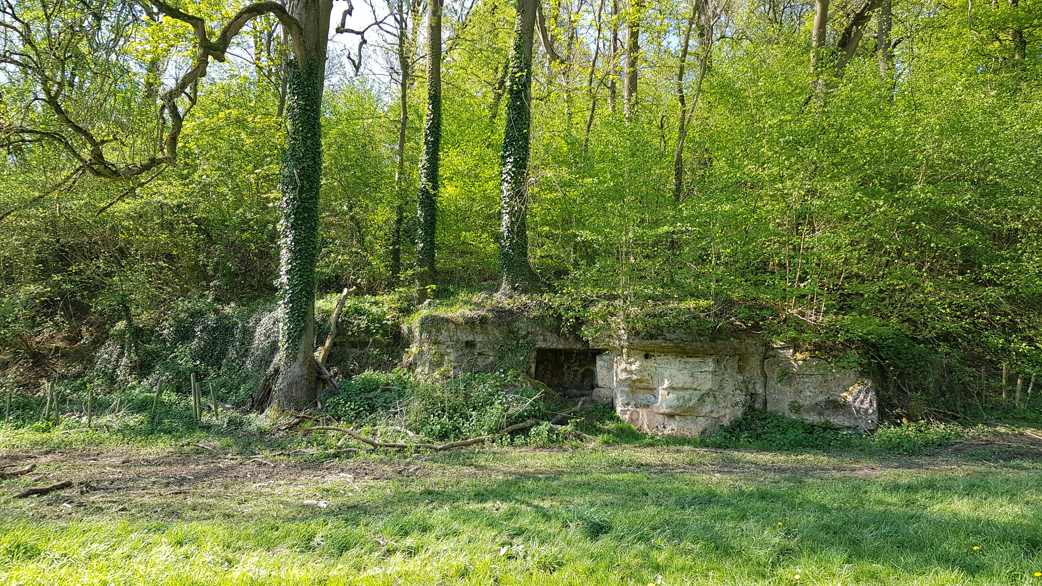 Groeve achter Lemmekenskoel, Sibbe, Nederland